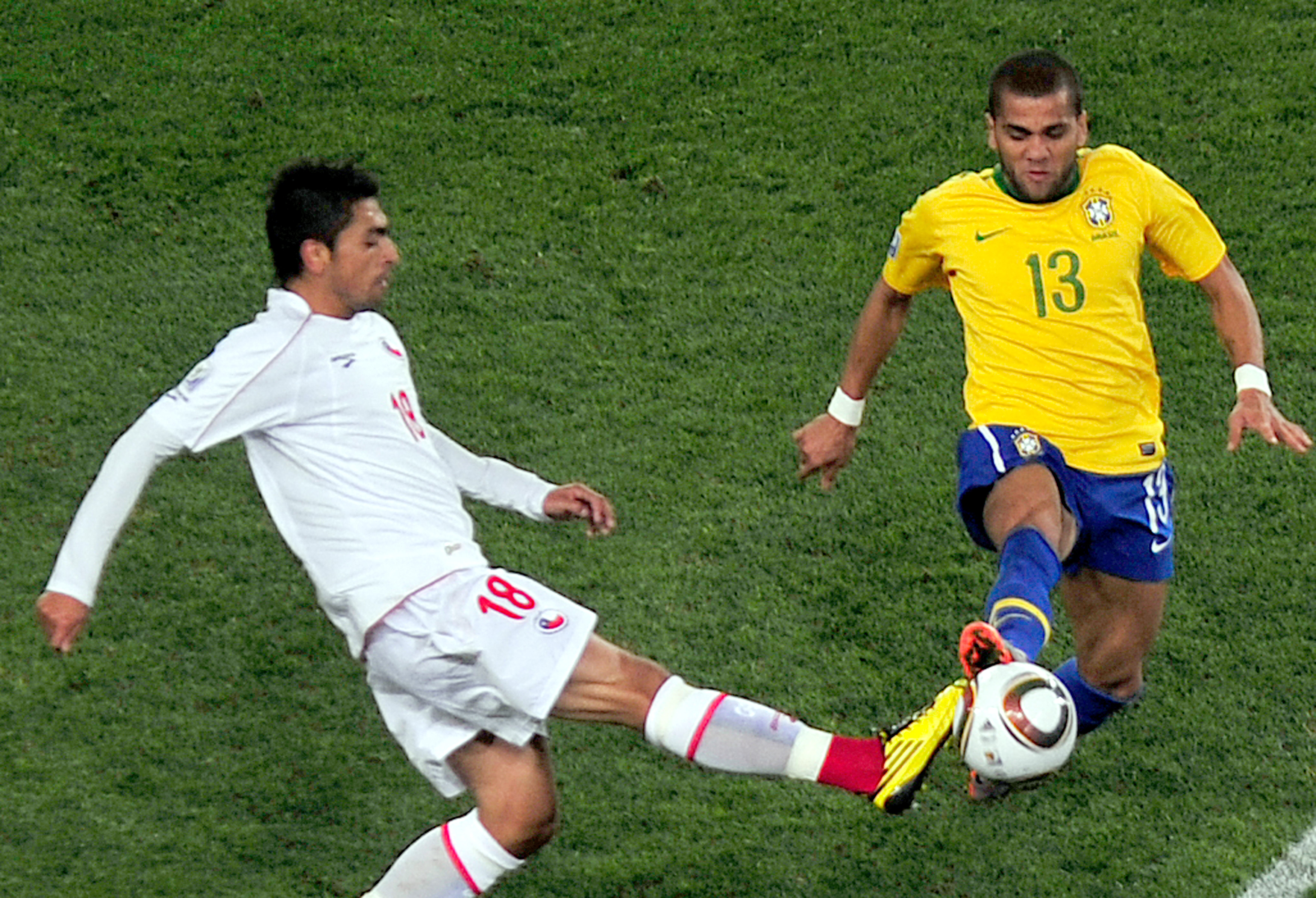 Joanesburgo - Com a vitória de 3 x 0 sobre o Chile, a seleção brasileira passa para as quartas de final da Copa do Mundo.